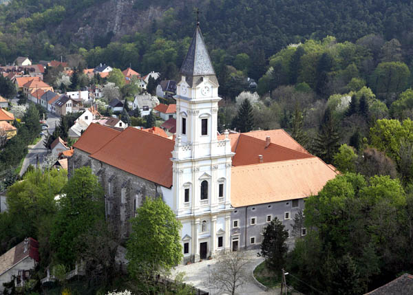 A karmelita kolostor légi felvételen, Sopronbánfalva